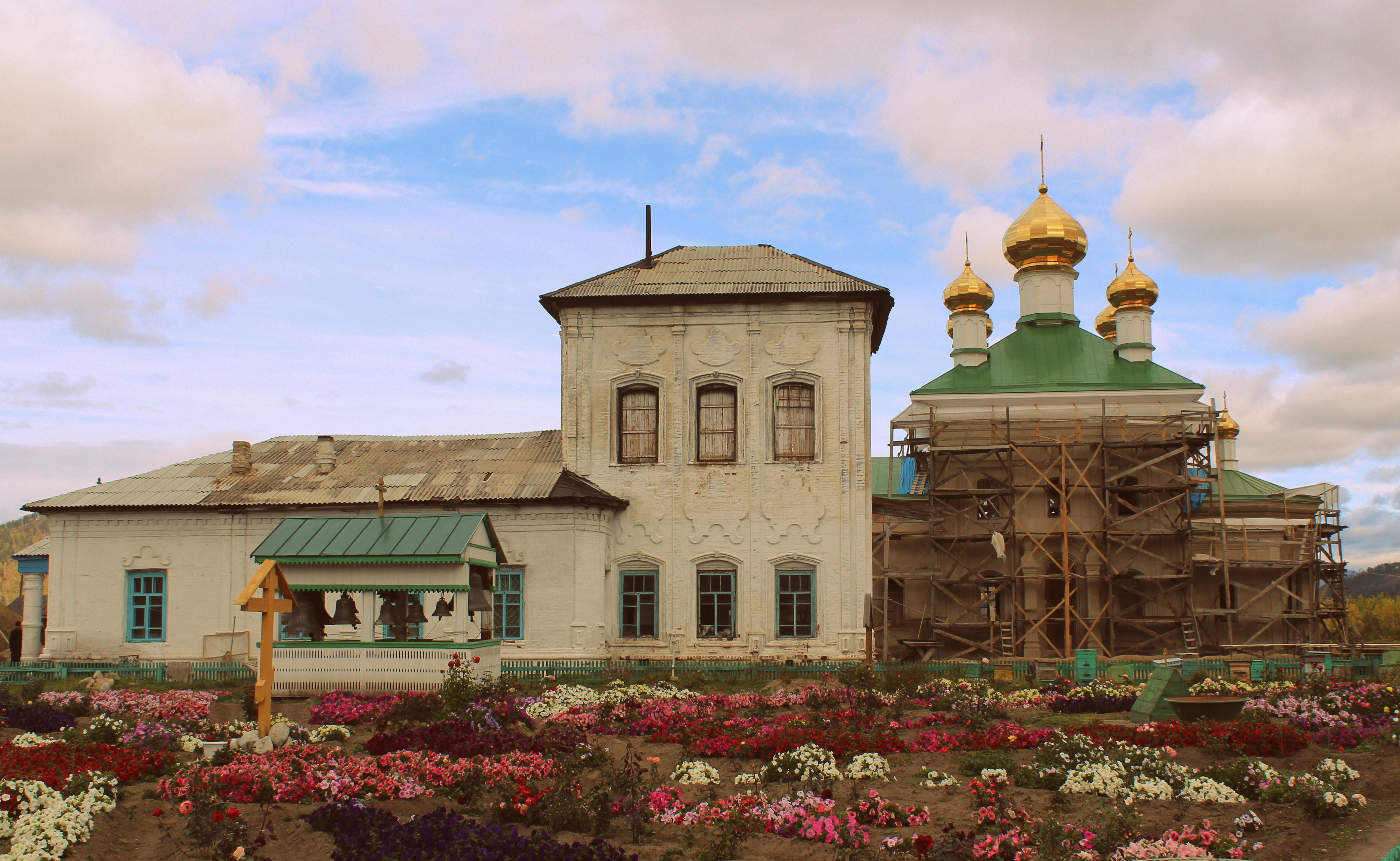 Свято-Троицкий Селенгинский мужской монастырь